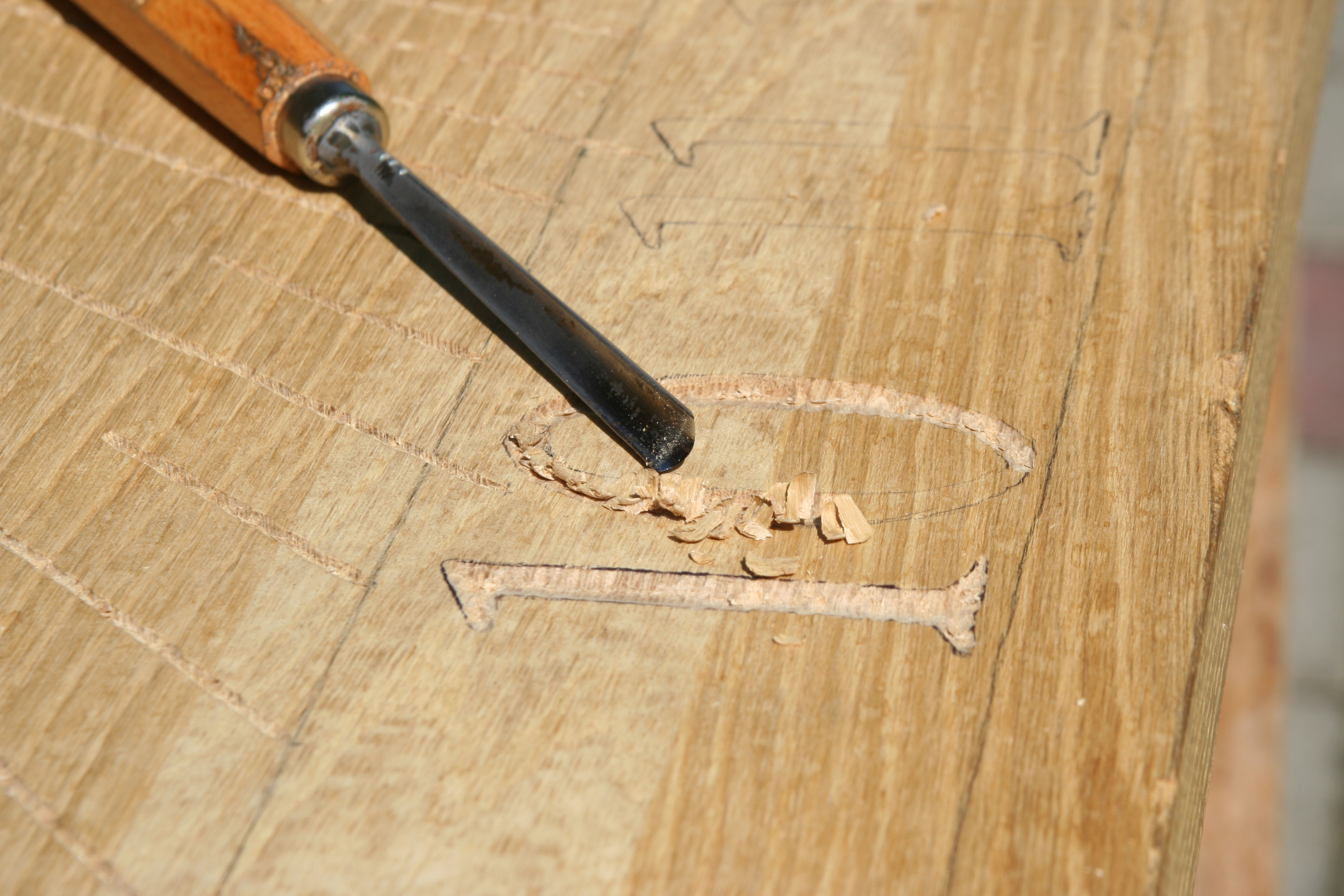 schnitzmesser und tweilweise geschnitzes (sonnenuhr)